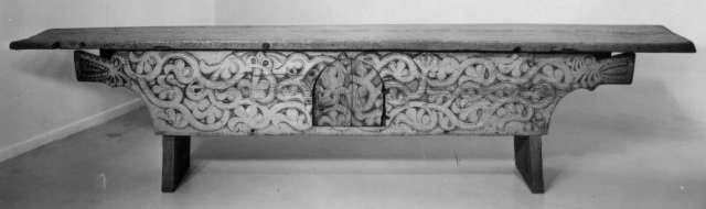 Kistebord fra gården Heggtveit i Brunkeberg, Kviteseid i Telemark. Etter en radiologisk datering er bordet anslått å være laget mellom 1305 og 1395. Lengde 296,5 cm. Norsk Folkemuseum, NF.1955-0611.